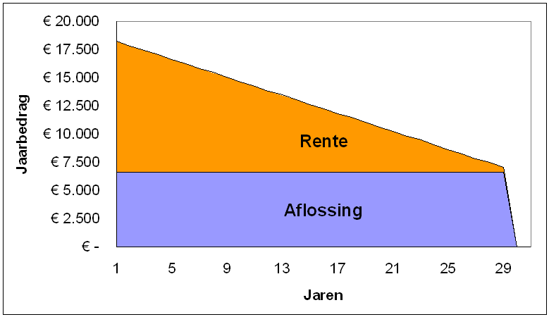 Grafiek lasten lineaire hypotheek